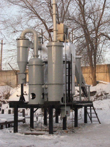 Газотеплогенератор обращенного типа. Предназначен для получения генераторного газа из органических отходов